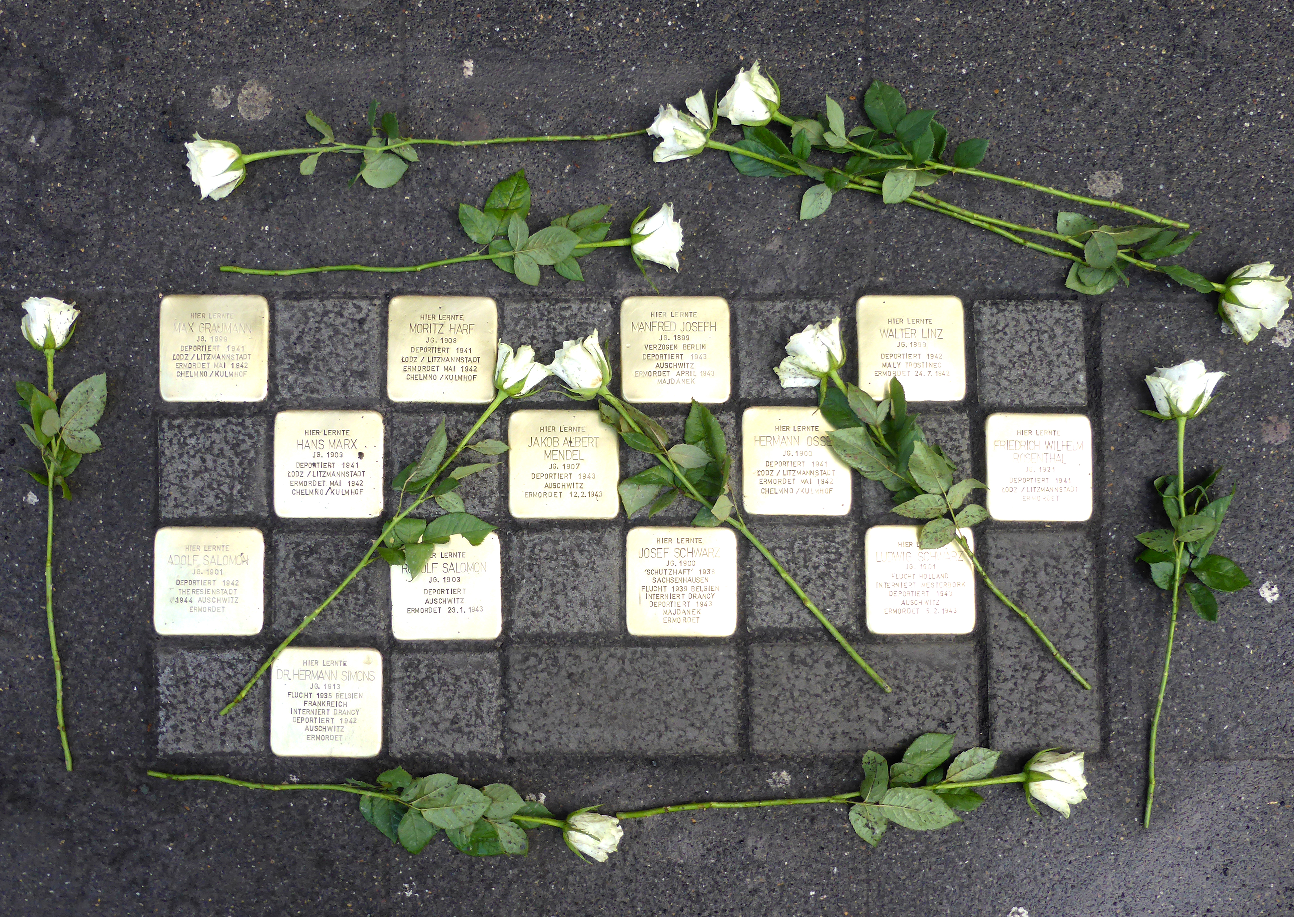 Stolperstein: Verlegestelle Schaurtestraße 1, Köln.